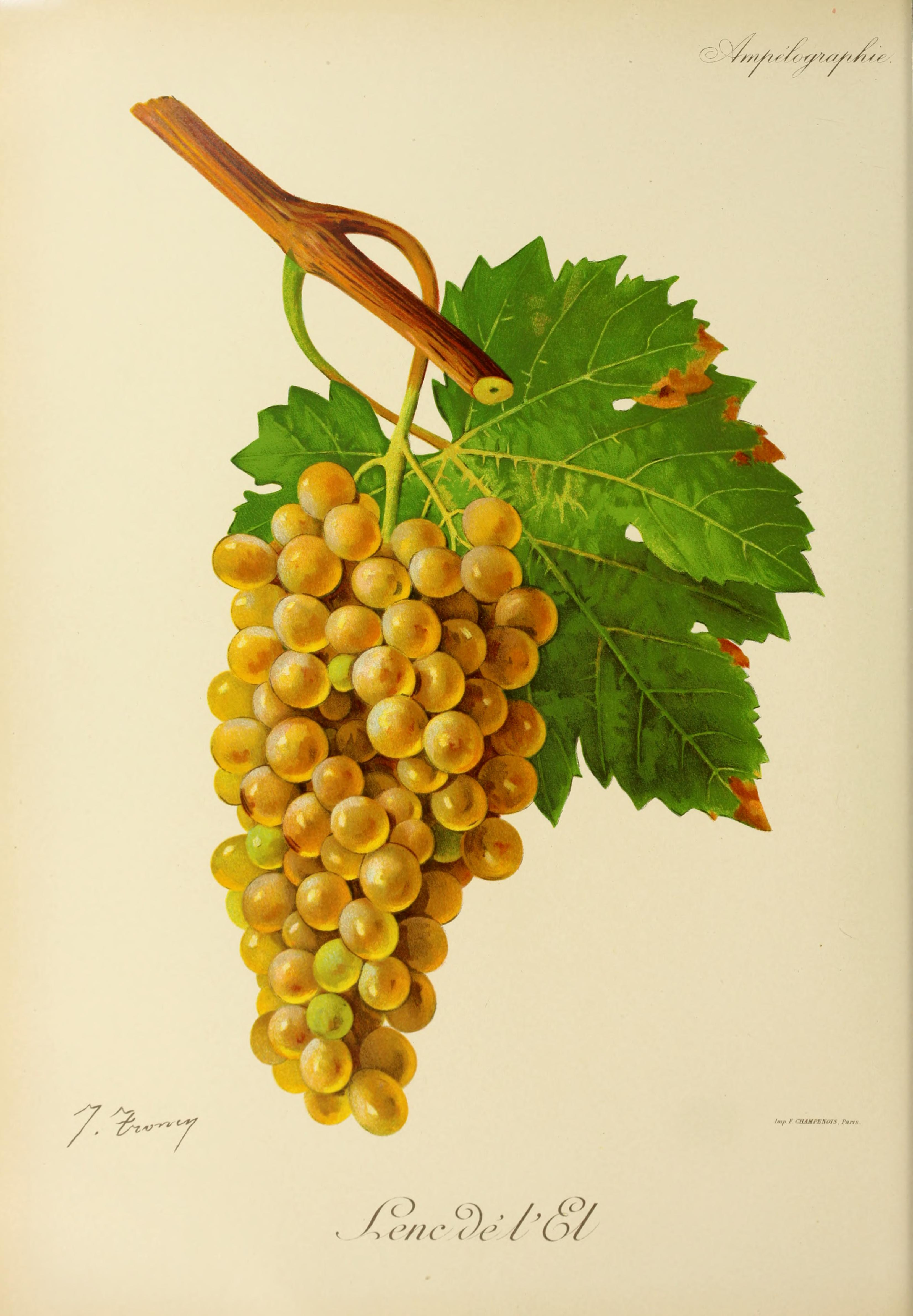 Grappe de Len de l'el par Viala et Vermorel